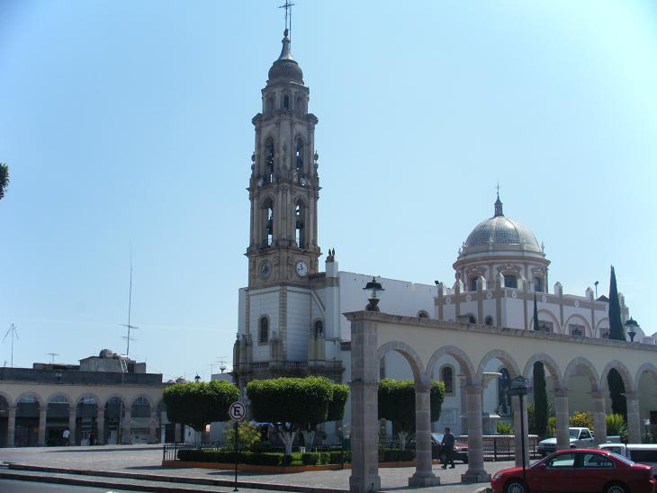 Primer cuadro Uriangato